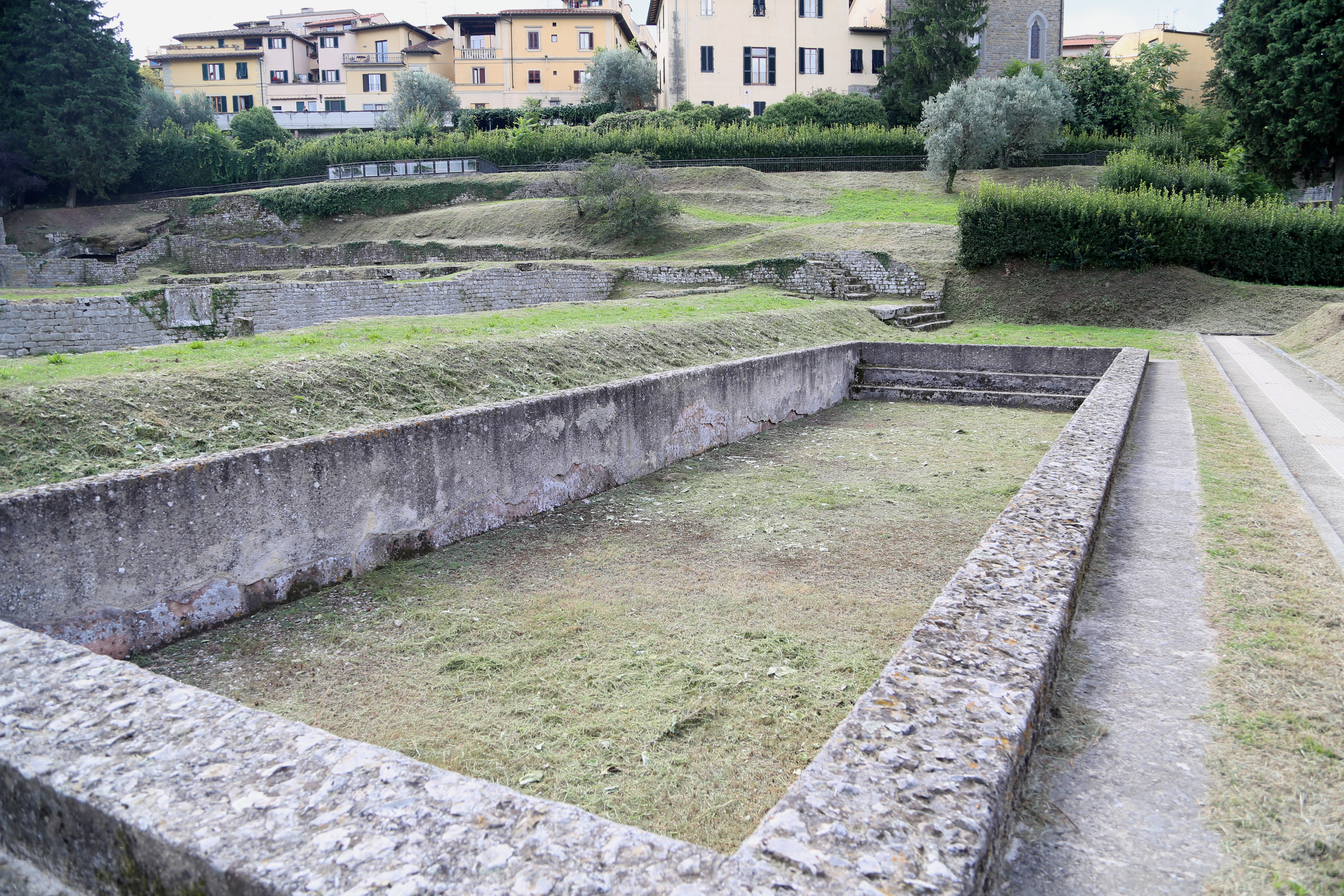 Römische Thermen, Zona Archeologica, Fiesole